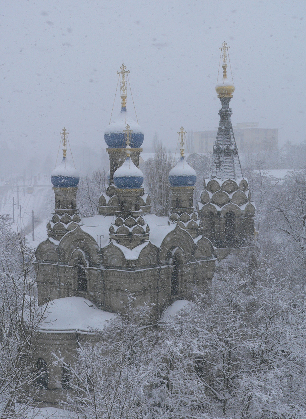 Russisch Orthodoxe Kirche in der Südvorstadt in Dresden